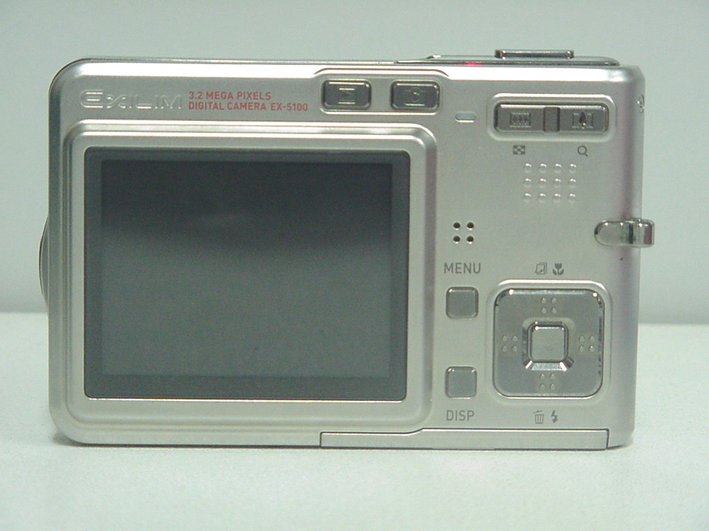 Appareil photographique numérique Casio Exilim EX-S100 - Vue arrière